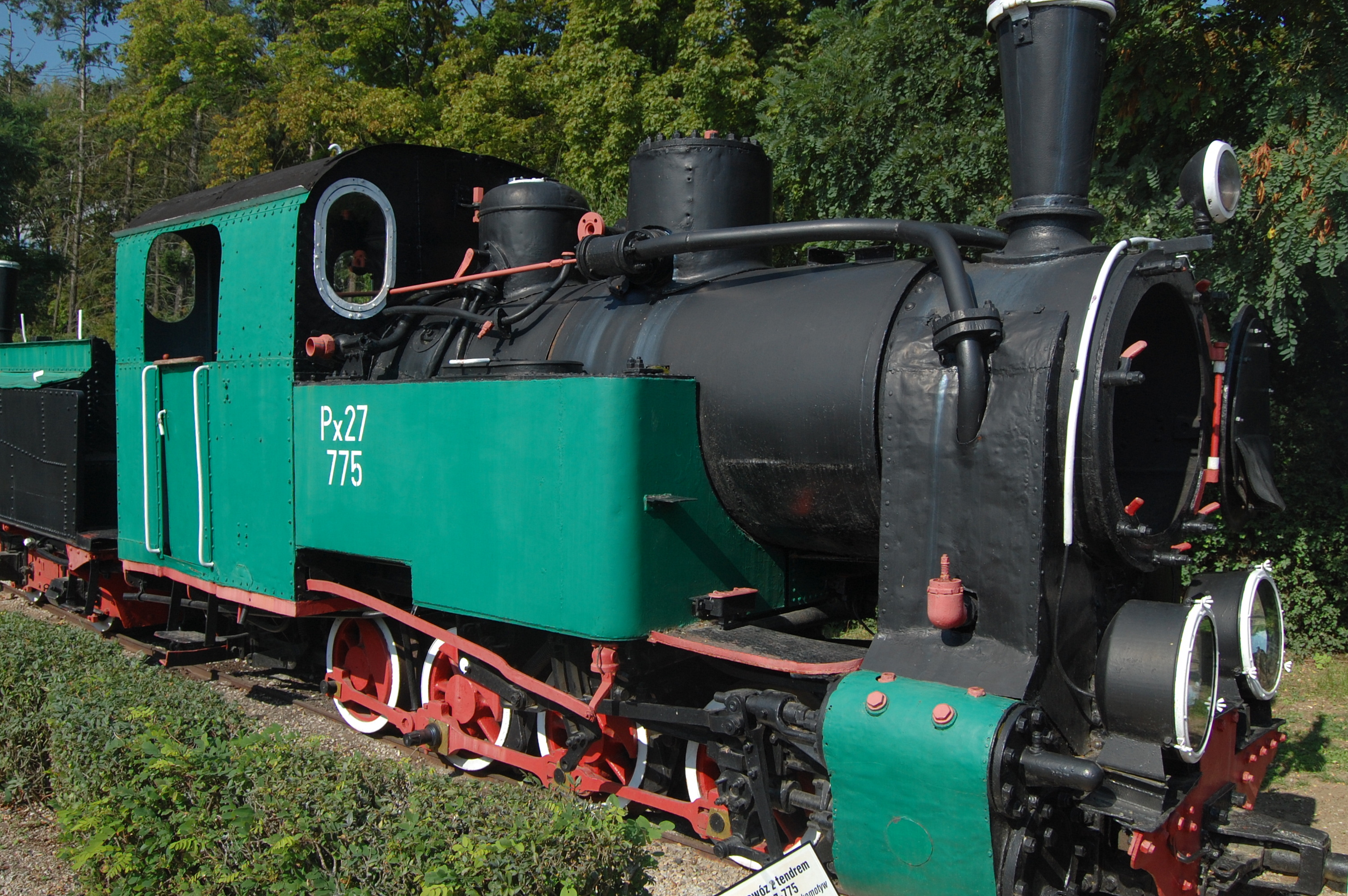 Úzkorozchodná parní lokomotiva Px27-775 v muzeu v Wenecji (Polsko)